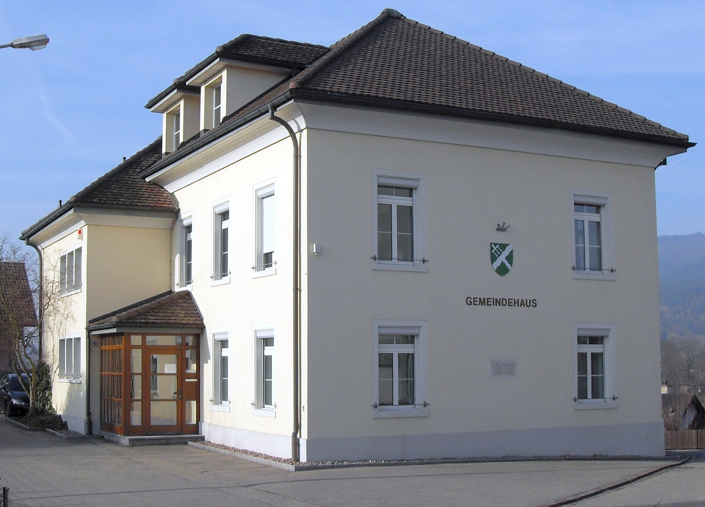 Gemeindehaus Sisseln, Kanton Aargau, Schweiz